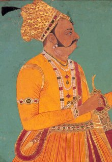 Bakht Singh